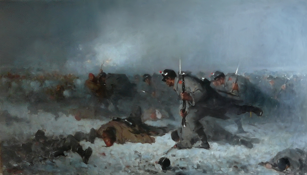 Atacul de la Smârdan - Muzeul de Artă din Craiova